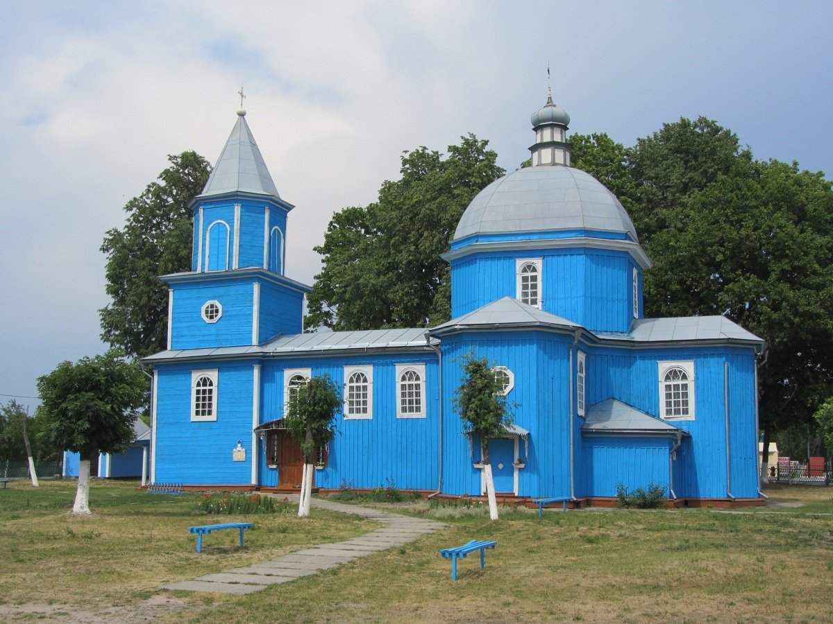 Ельск. Царква